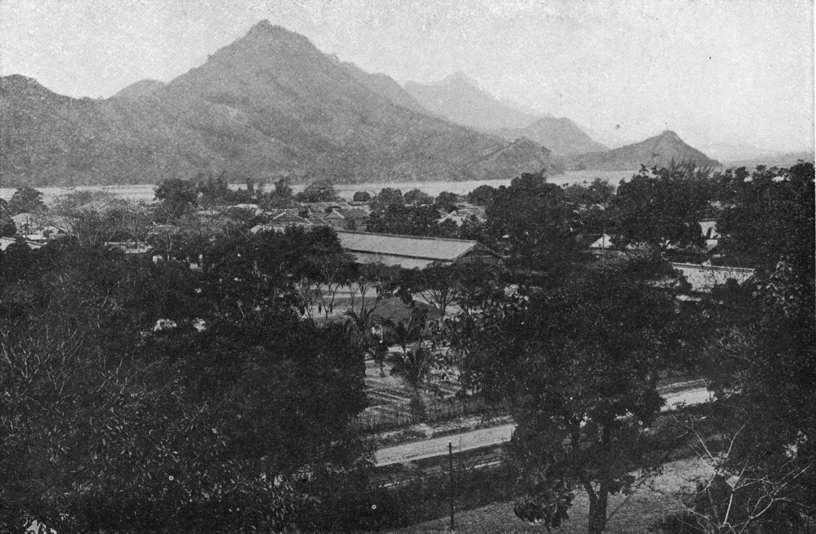 中文（台灣）: 作者：勝山吉作。旗山街(蕃薯藔)。典藏者：中央研究院數位物件典藏者：中央研究院數位文化中心。公眾領域標章（Public Domain Mark）。發佈於《開放博物館》[1]（2020/04/28瀏覽）。